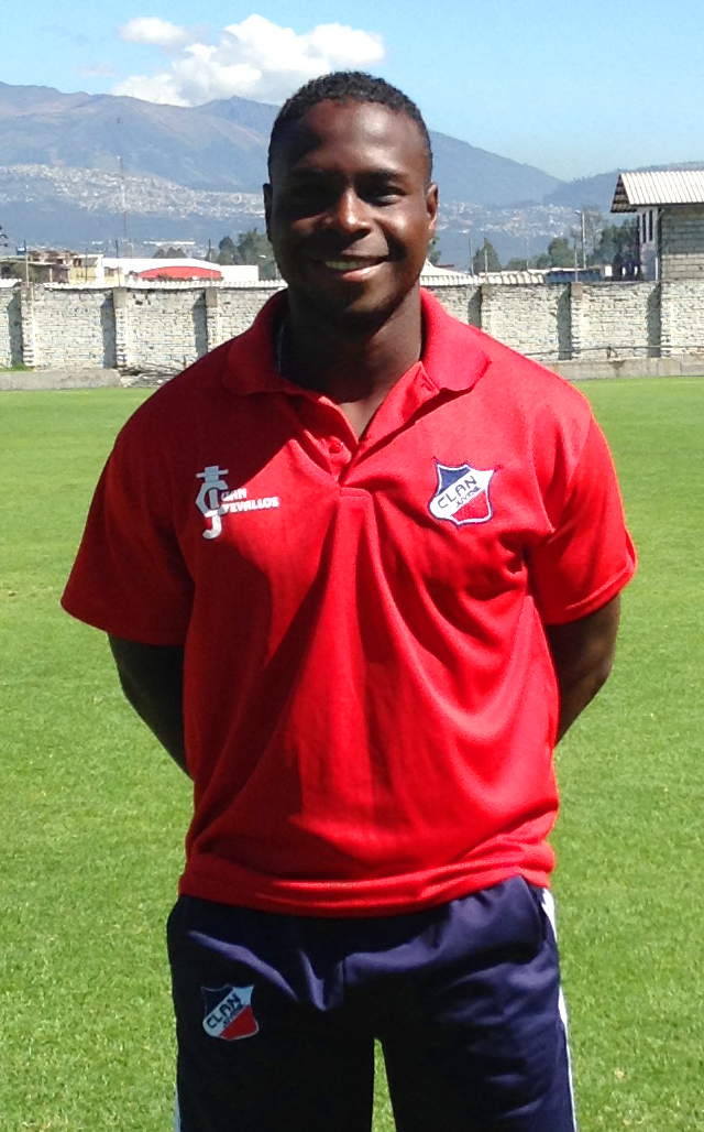 Nilo Valencia en el Clan Juvenil del 2012